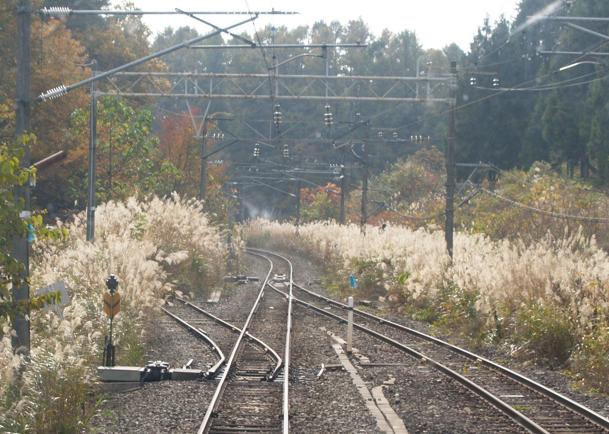 更科信号場（翁島寄りのポイント。郡山行列車の先頭から撮影）